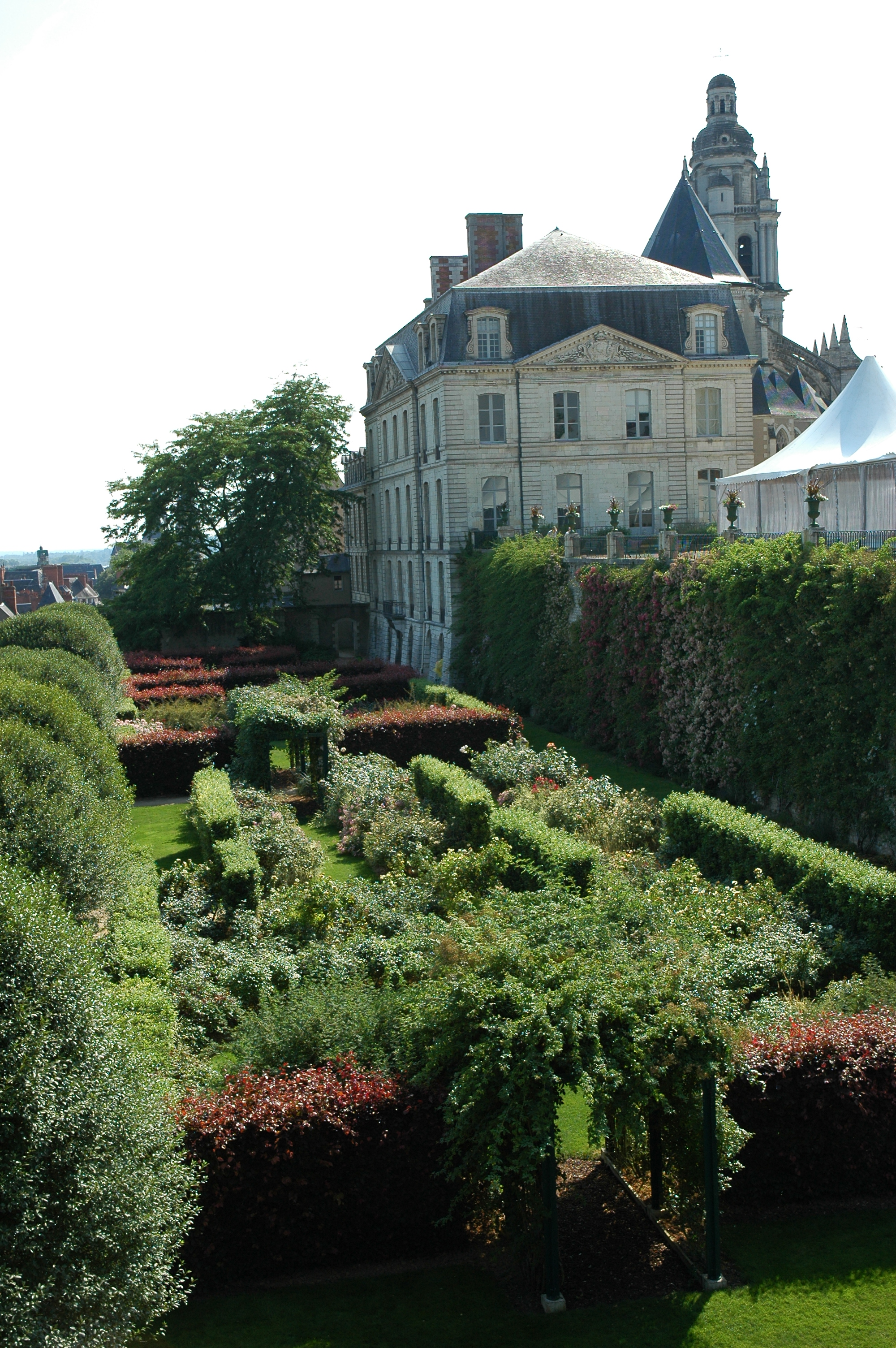 France Loir-et-Cher Blois Hôtel de ville Photographie prise par GIRAUD Patrick